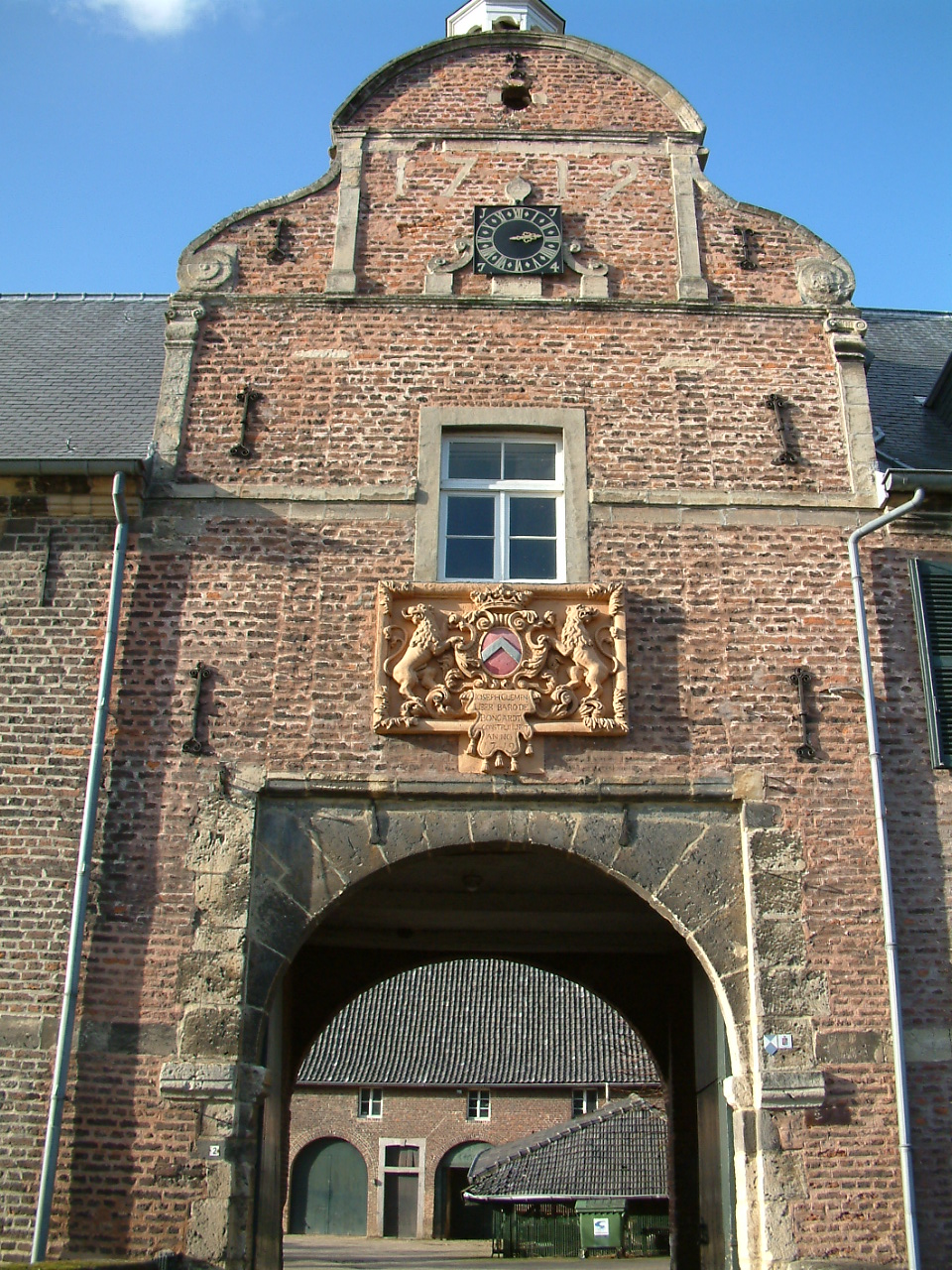 Kasteel Wijnandsrade